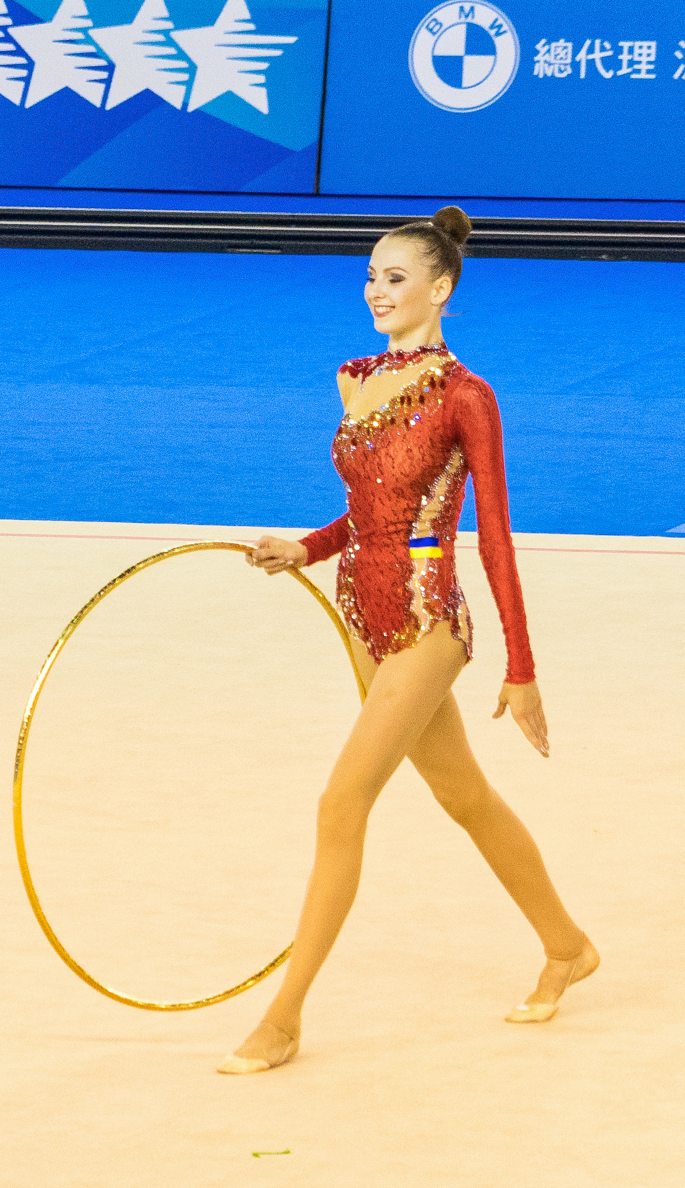 2017 Taipei Summer Universiade